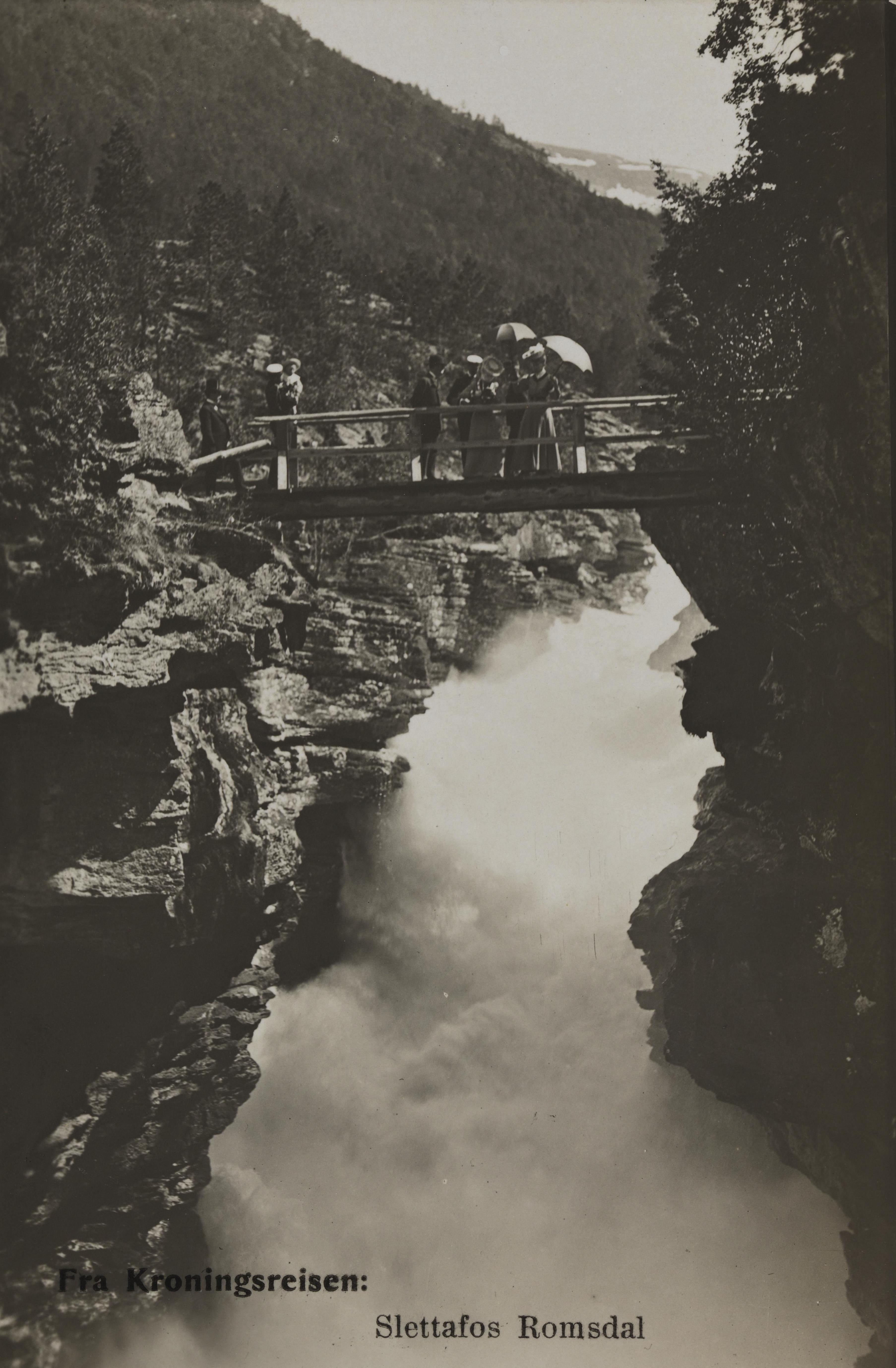 Bildet er hentet fra Nasjonalbibliotekets bildesamling Slettafossen, Rauma, Møre og Romsdal